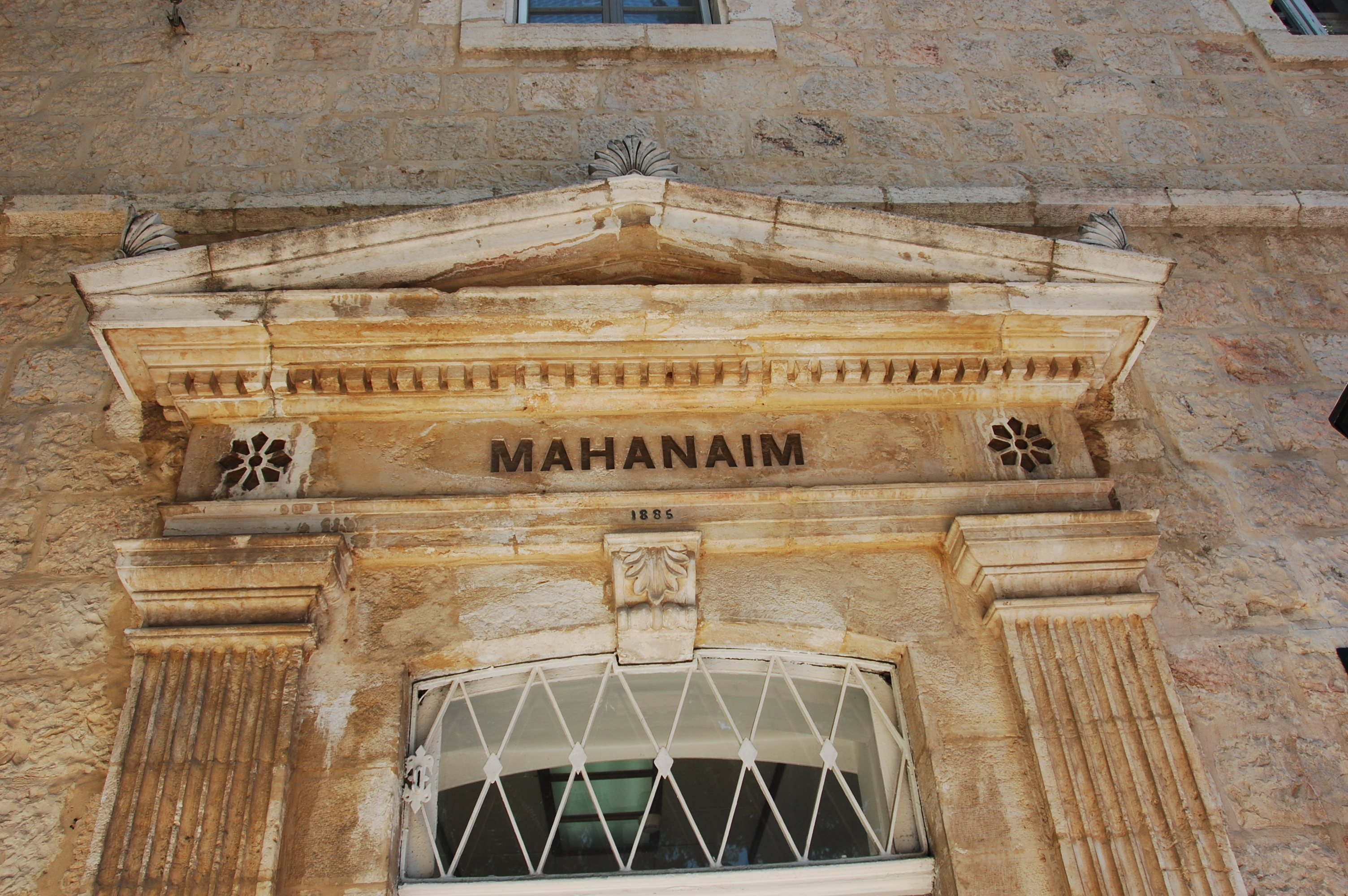 Mahanaim house, jerusalem 2007